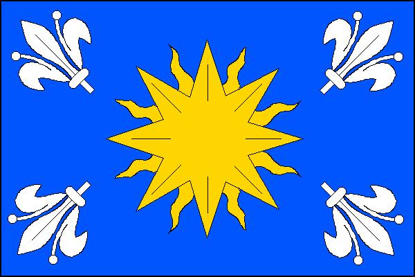 Vlajka obce Senetářov